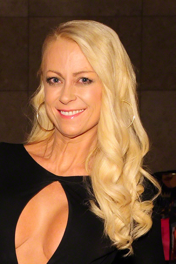 Jenny Elvers auf der Dolphin Aid Gala in Düsseldorf am 30. November 2013